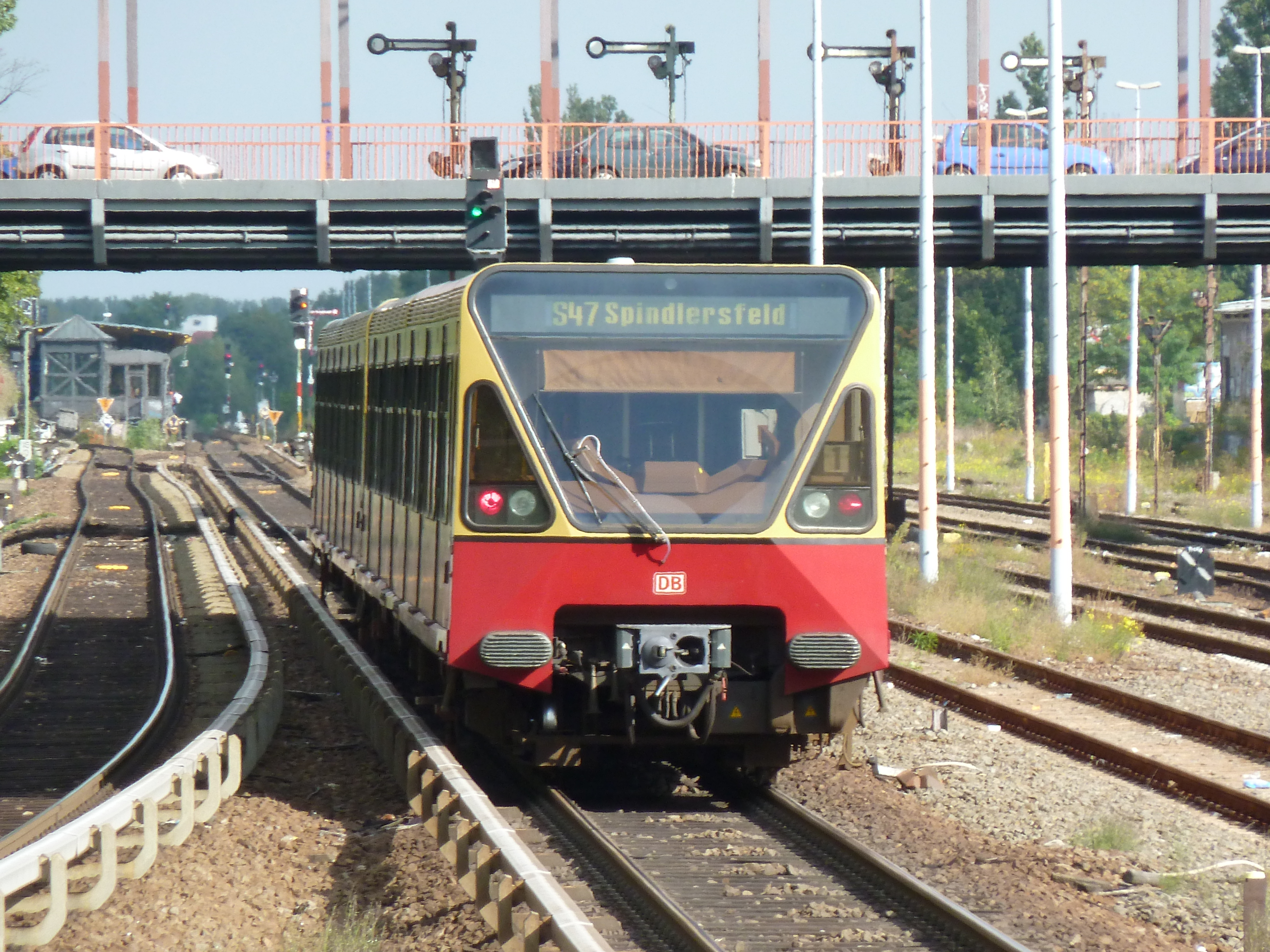 S-Bahnzug der Baureihe 480 fährt aus dem Bahnhof Hermannstraße in Richtung Neukölln aus 01.Oktober 2010